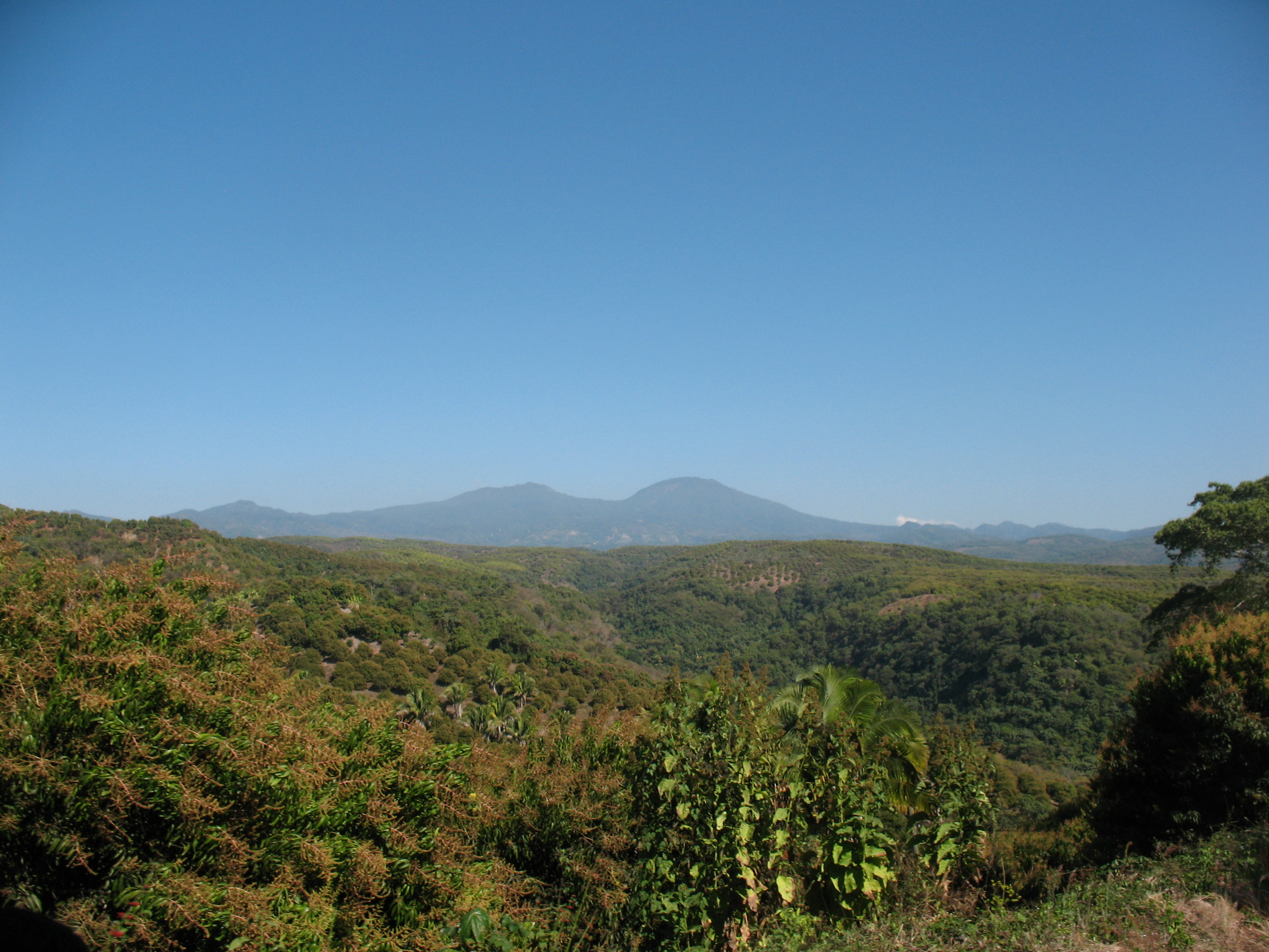 "Pasando por la cascada del Cora"